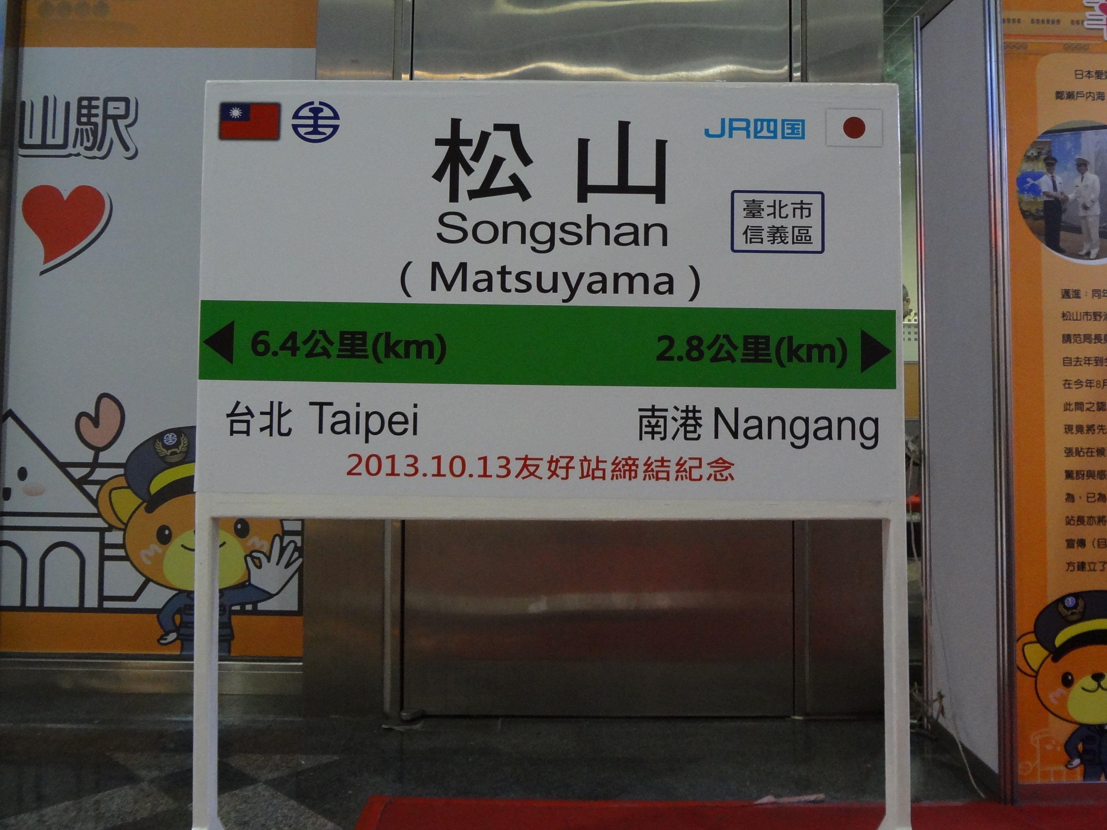 臺灣鐵路管理局松山車站與四國旅客鐵道松山車站締結姊妹站紀念牌，位於臺灣鐵路管理局松山車站地下一樓。